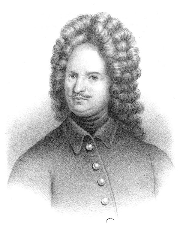 Alexander Magnus Hummerhielm (1643-1723)